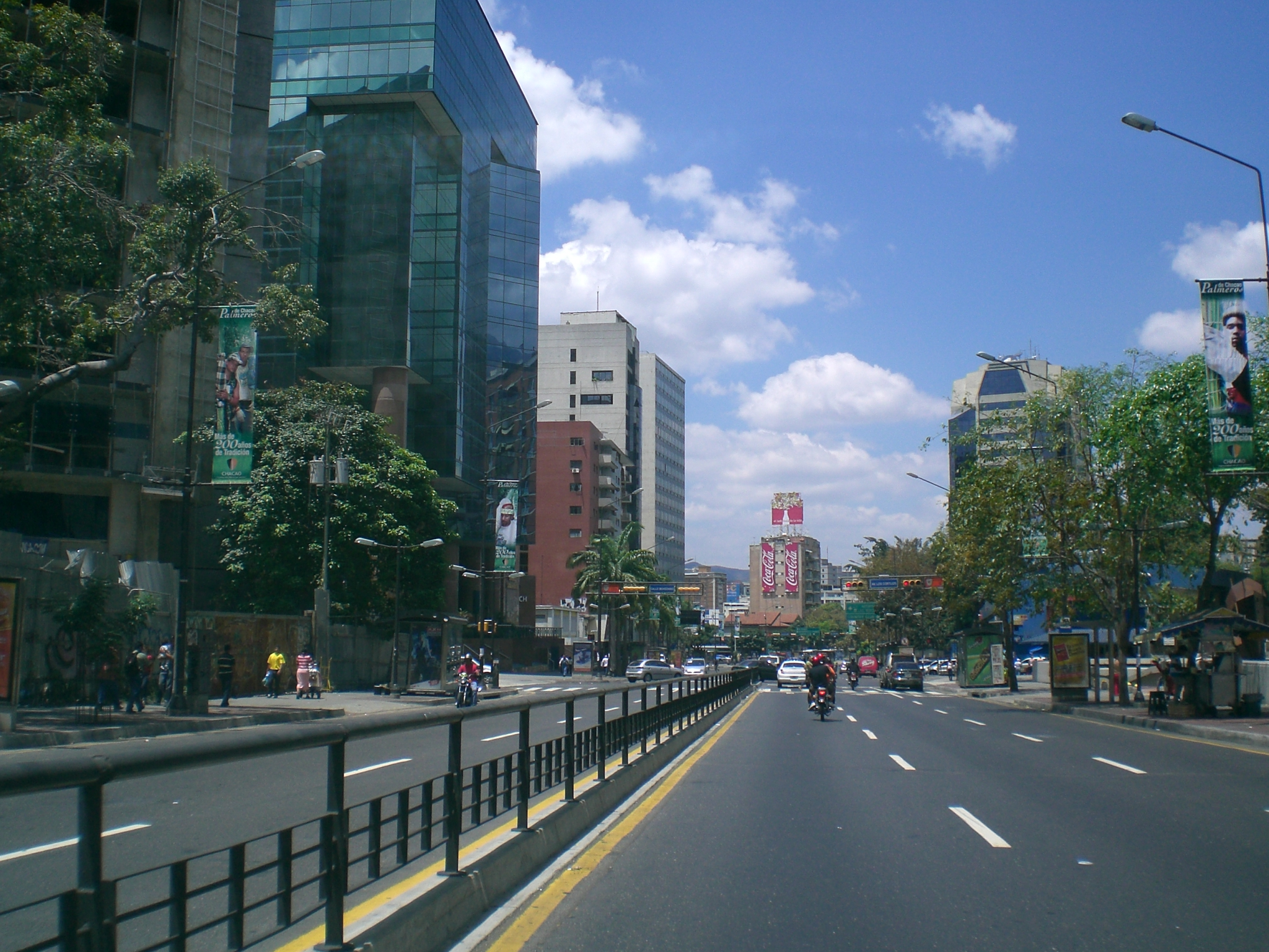 Francisco de Miranda Avenue in Chacao Municipality, Caracas, Venezuela